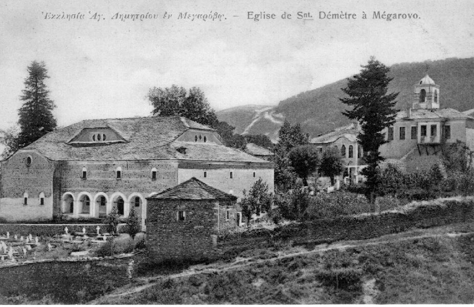 Св. Димитриј, Магарево,битолско